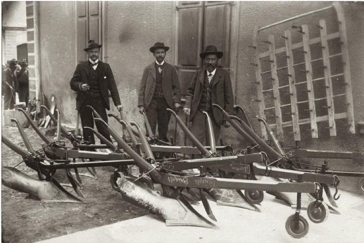 Arnold Giger, der Begründer der Historischen Werkstätte Mulin-Schnaus, mit Söhnen auf dem Markt in Ilanz 1904